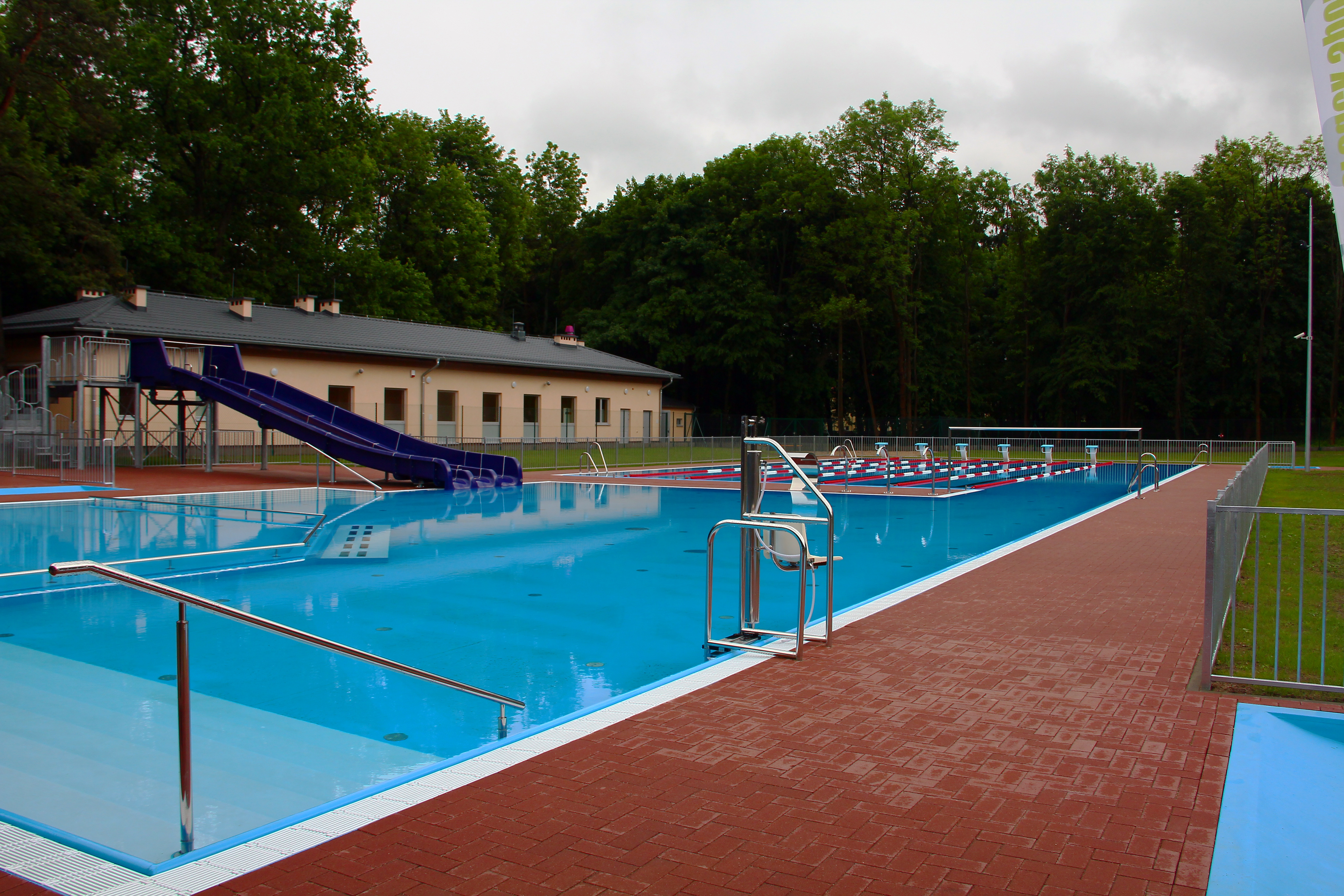 Odnowiony basen kąpielowy w Bartoszycach.